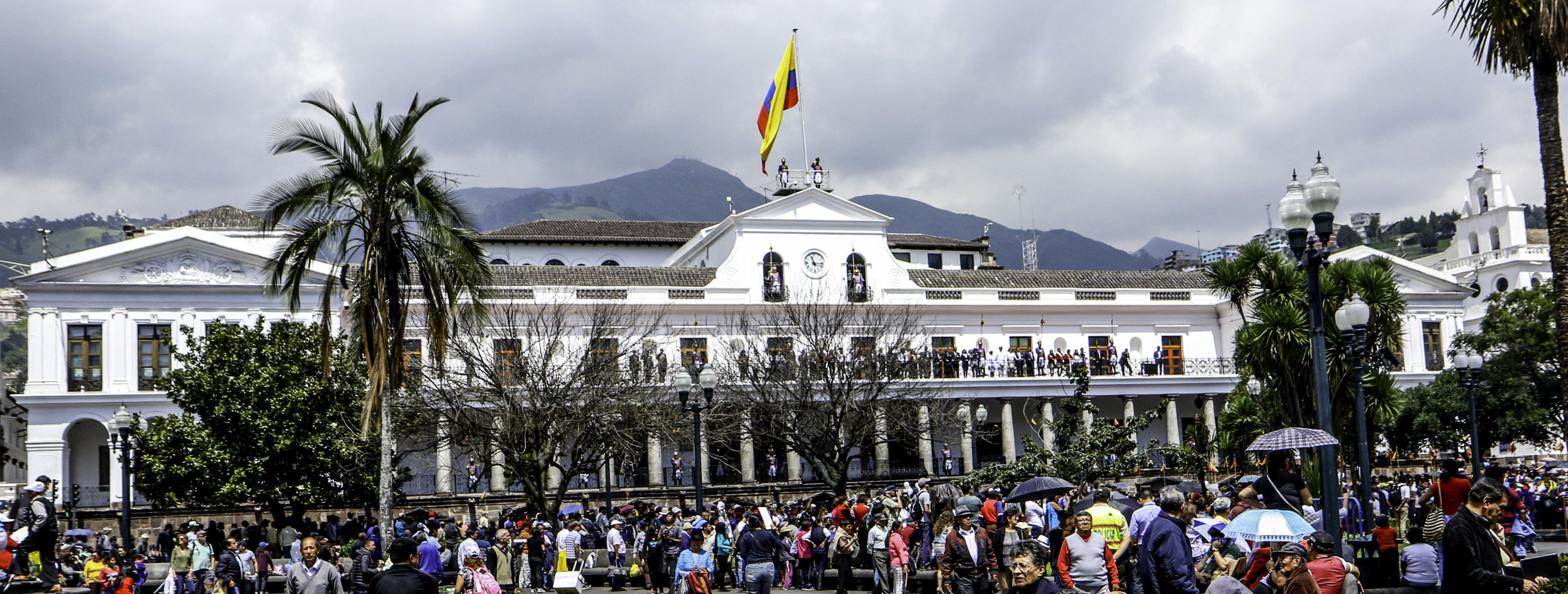 Quito, 16 enero 2017 (Andes).- Fachada del Palacio de Carondelet o Palacio de gobierno ubicado en la Plaza Grande, Centro Histórico de Quito. ANDES/Micaela Ayala V.